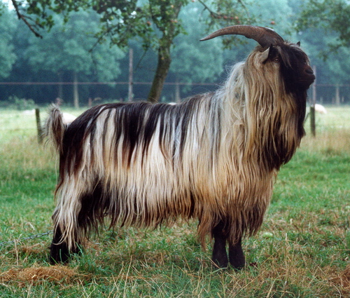 Nederlandse Landgeit bok2 categorie:afbeelding geit